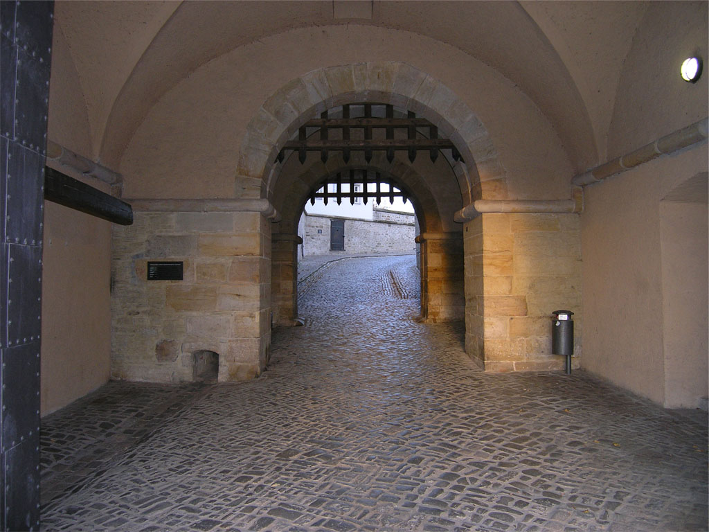 Torhalle und Fallgitter des Peterstors (errichtet zwischen 1666 und 1668), Haupttor der Zitadelle Petersberg in Erfurt